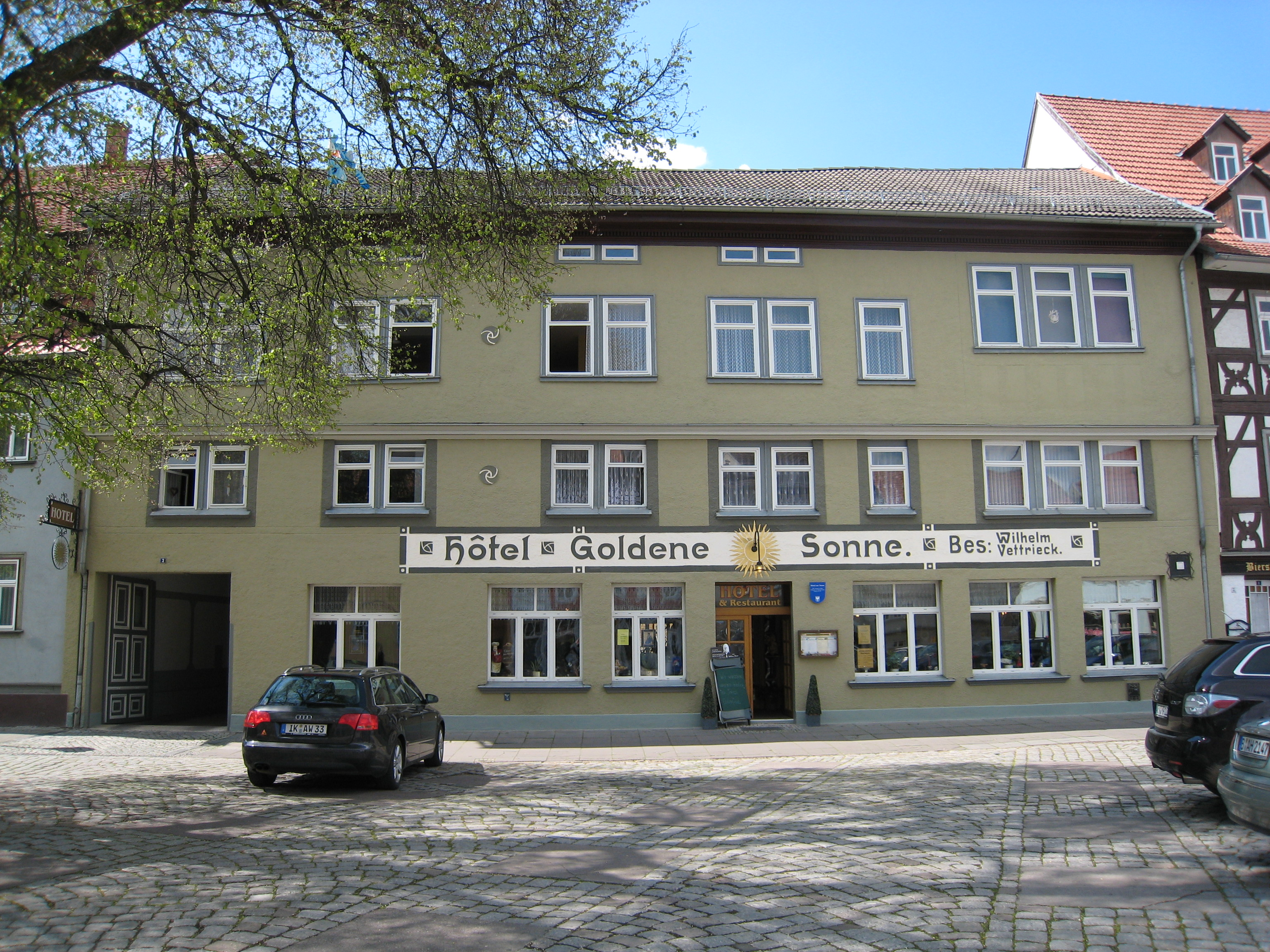 Das älteste, noch heute betriebene Gasthaus in Arnstadt, die "Goldene Sonne" am Ried. "Hôtel Goldene Sonne. Bes:WilhelmVettrieck."